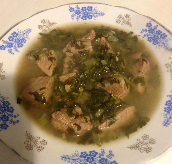 Чакапули